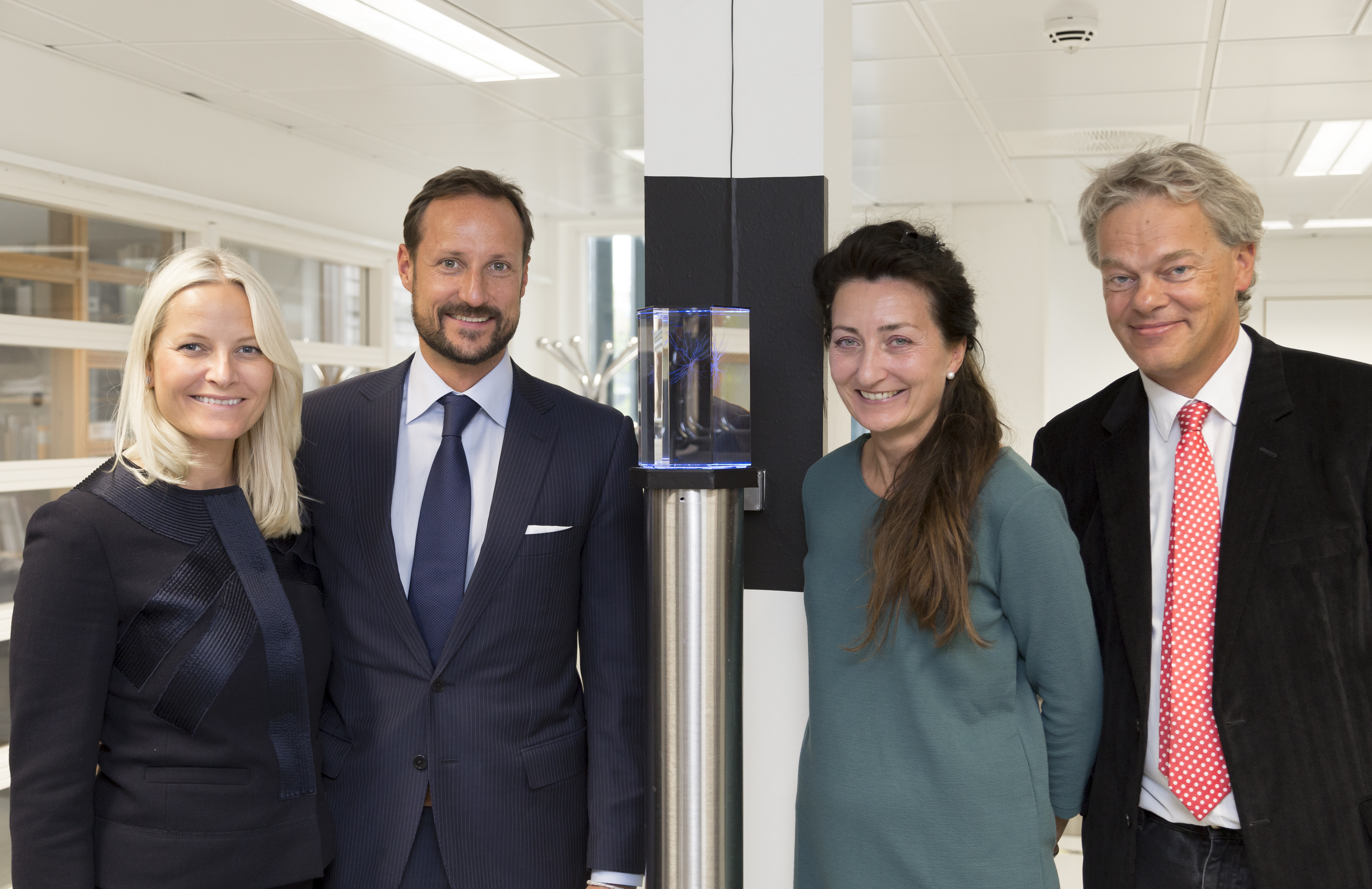 Trondheim 02.09.2015 : Kronprinsparet besøker Kavliinstituttet på NTNU. Foto: Thor Nielsen